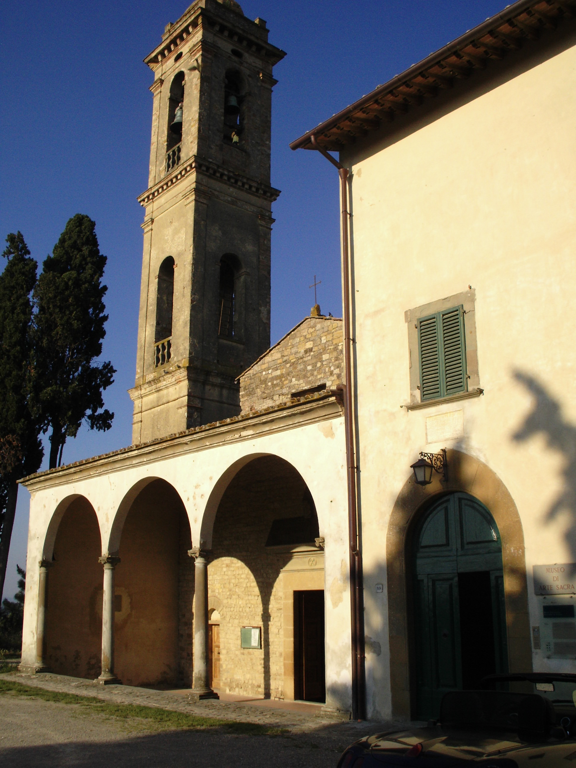 Tavarnelle val di Pesa, Museo di Arte Sacra, foto dell'ingresso